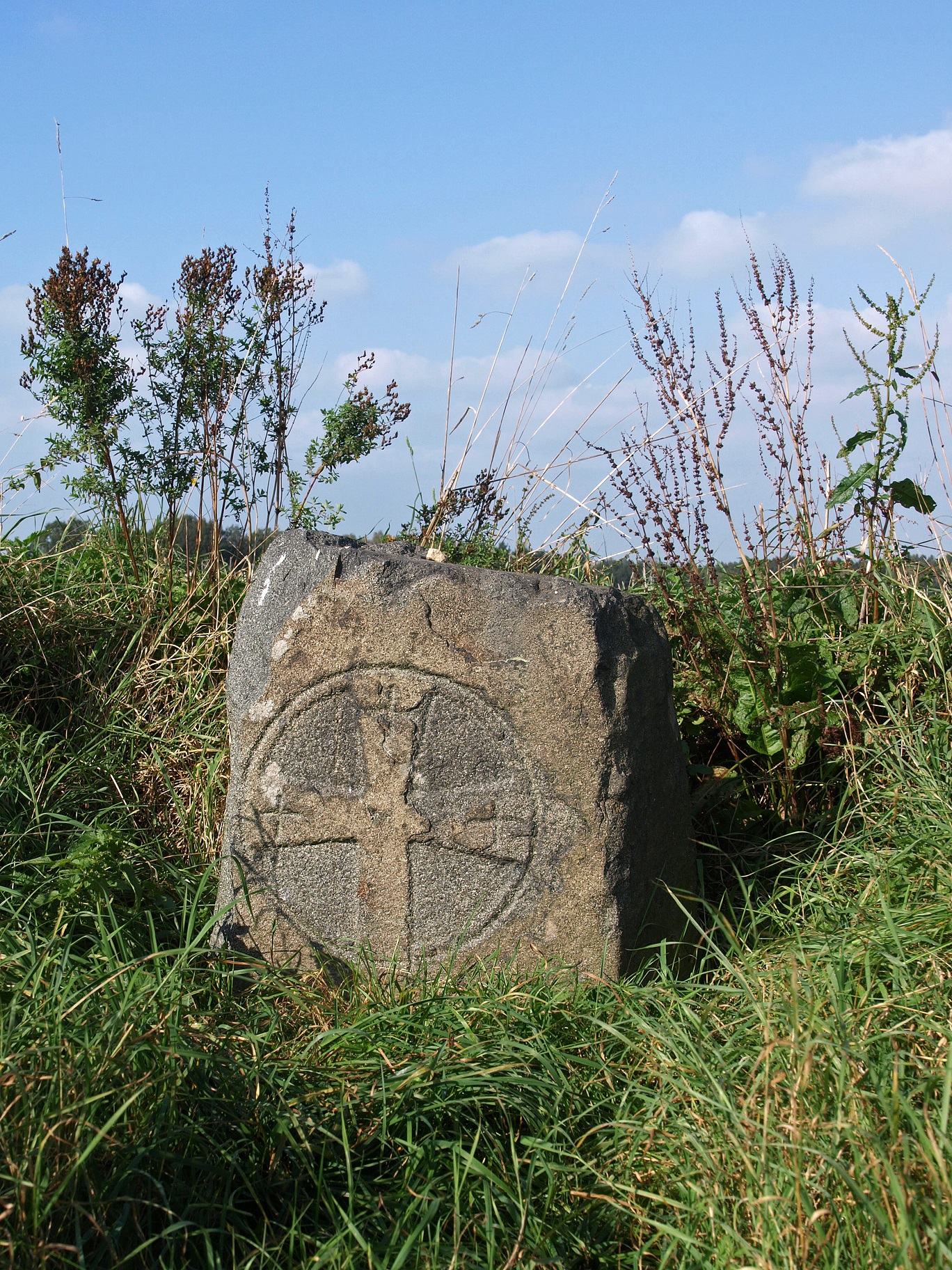 Scheibenkreuzstein in Drehsa, OT von Weißenberg Hornjoserbsce: Křižny kamjeń w Droždźiju